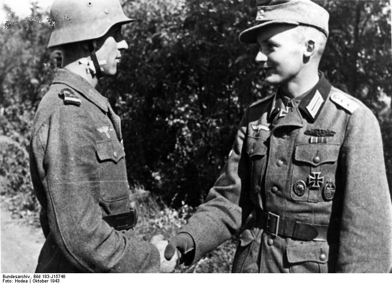 Verleihung der Goldenen Nahkampfspange Mit der Goldenen Nahkampfspange ausgezeichnet Aus der Hand seines Abteilungskommandeurs, Ritterkreuzträger Hauptmann Sassenberg, empfängt dieser Obergefreite die Goldene Nahkampfspange für seinen beispielhaften Einsatz in zahllosen Nahkämpfen. PK-Aufnahme: Hodea, Scherl 21.10.43 [Herausgabedatum] 5192-43 Abgebildete Personen: Sassenberg, Hans-Hermann: Leutnant, Ritterkreuz (RK), Heer, Deutschland